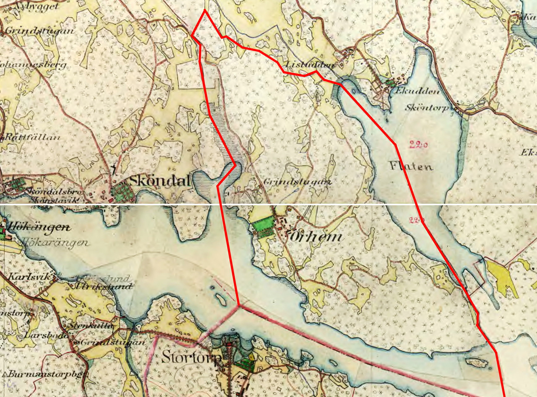 Orhems ägor enligt Häradsekonomiska kartan